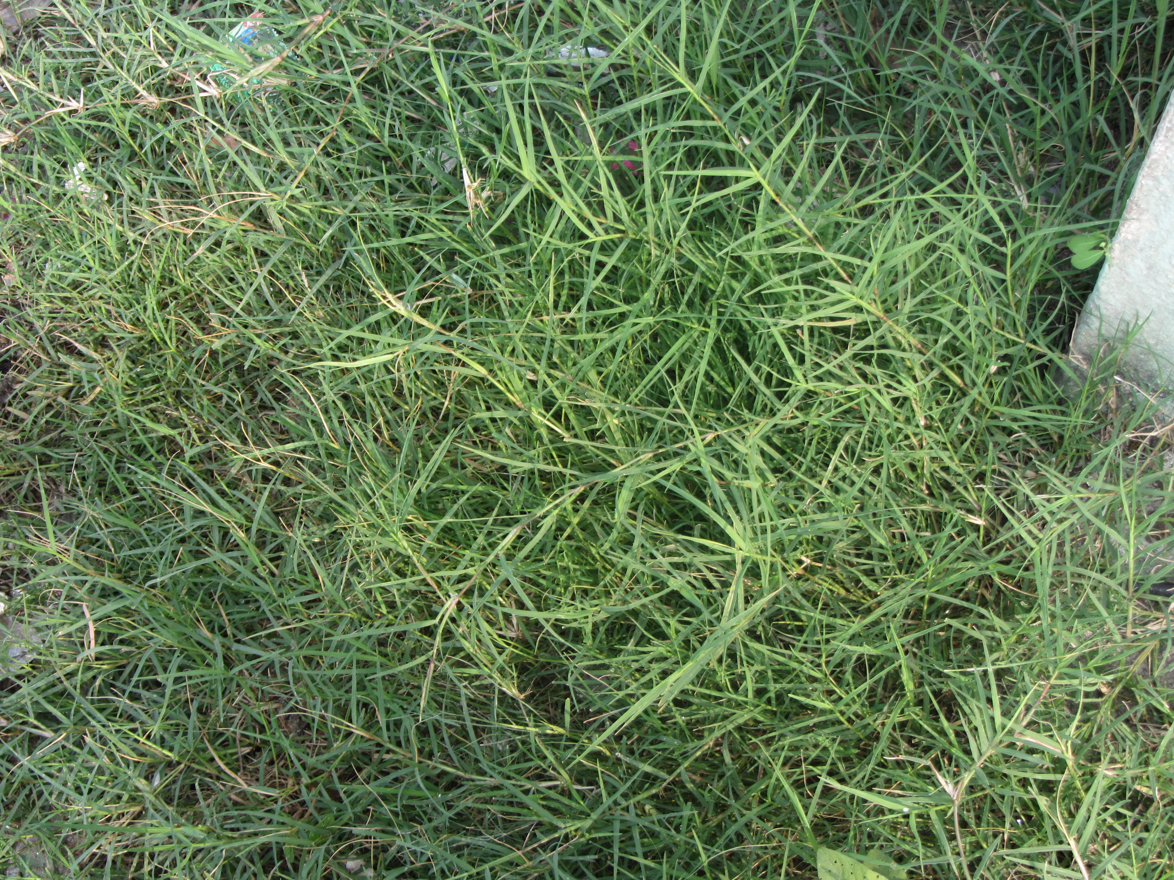 own creation அறுகு இல்லத் திருநாளில் தமிழர்கள் பிடித்து வைக்கும் பிள்ளையார் தலையில் செருகி வைக்கப்படும். அறுகினை வாடாப் பயிர் என்பர். காயுமே தவிர அறுகு வாடாது. அறுகம்புல்லை ஆடுமாடுகள் விரும்பி மேயும். அறுகம் புல்லுக்குக் கிழங்கு உண்டு. அதனால் இது மேய்ந்தாலும், காய்ந்தாலும் திரும்பவும் வளரும். உழவர்களுக்கு இது வயலில் தோன்றும் களை.